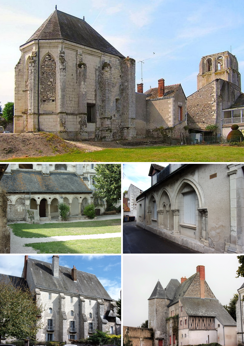 Photomontage de 5 vues de l'abbaye